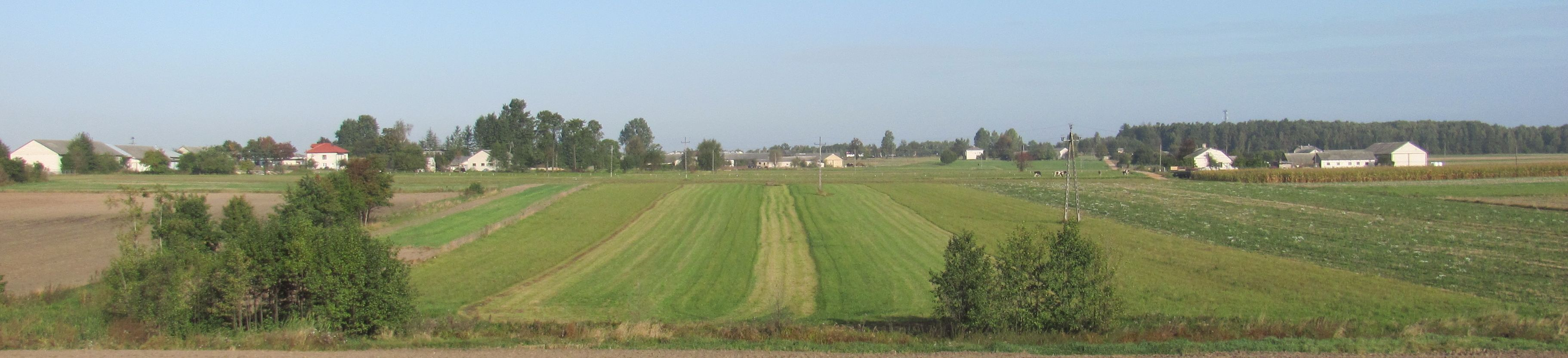 Północna część wsi Klukowo-Kolonia.